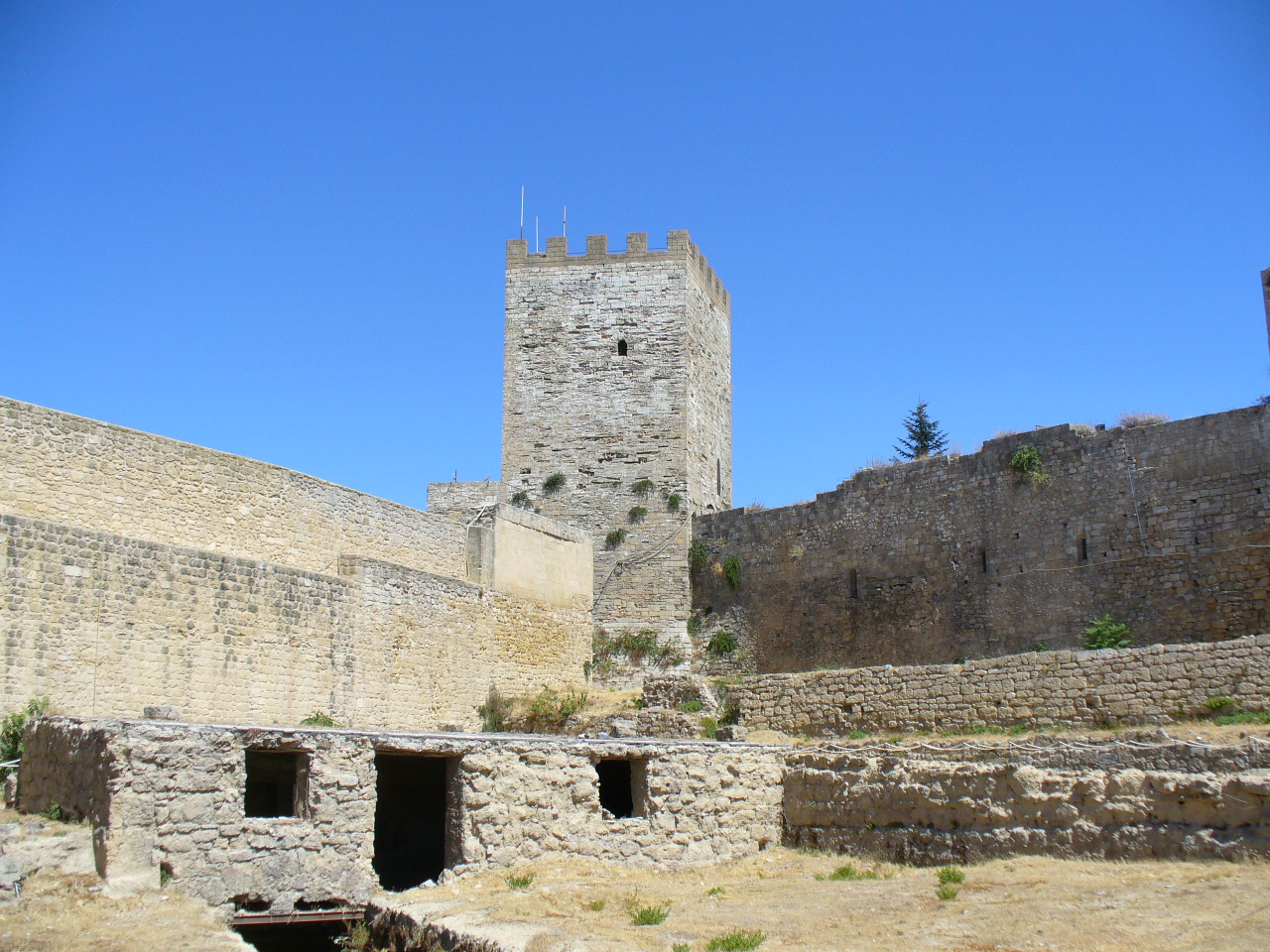 Cidade de Enna